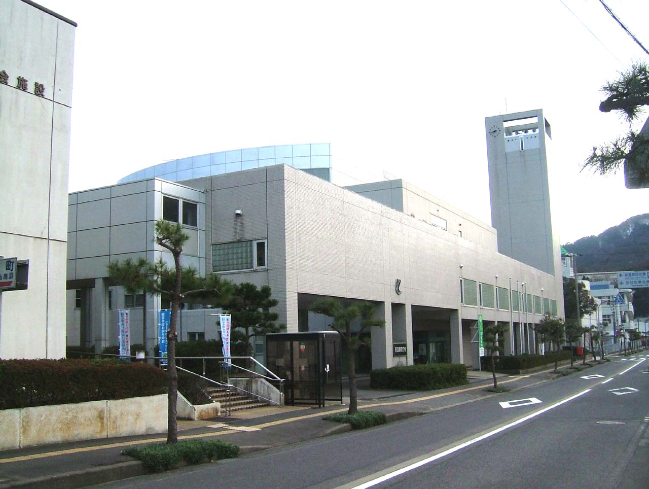 新温泉町役場